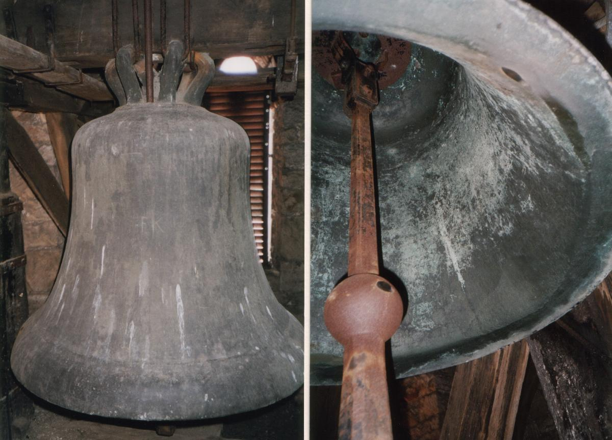 Betglocke der Nicolaikirche in Lemgo